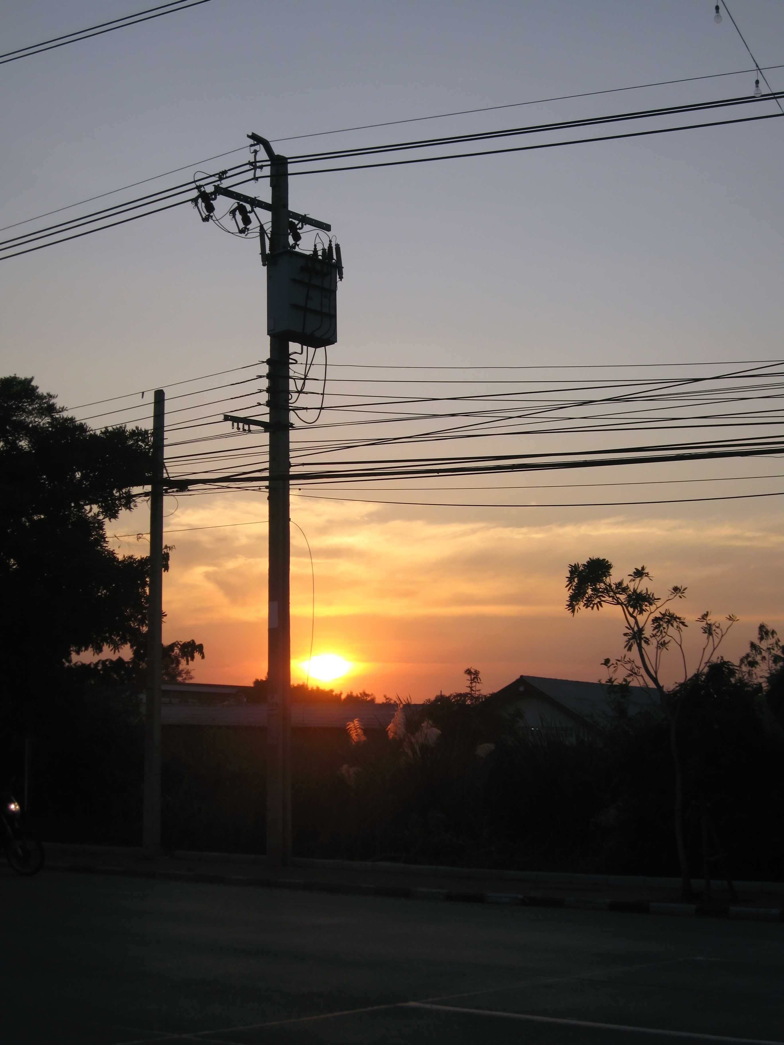 ถ.กิ่งแก้ว